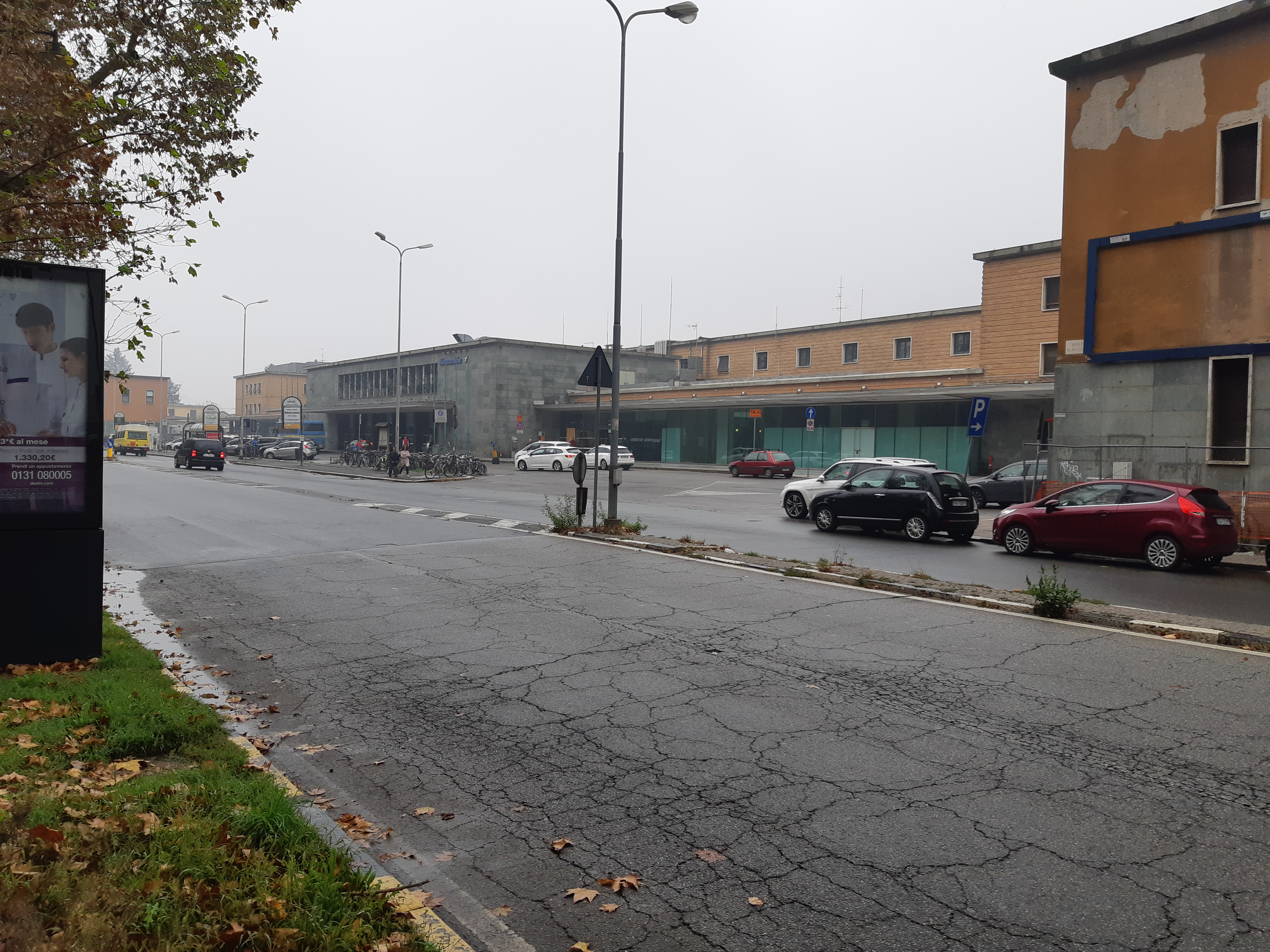 Bahnhof in Alessandria (Italy) 2019